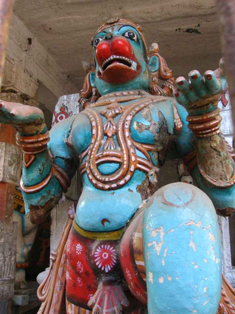 Hanuman at Kanchipuram